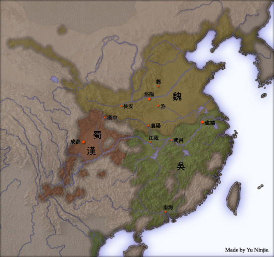 三国, 262年. Created and copyright (2004) by Yu Ninjie. Released under the GNU FDL.